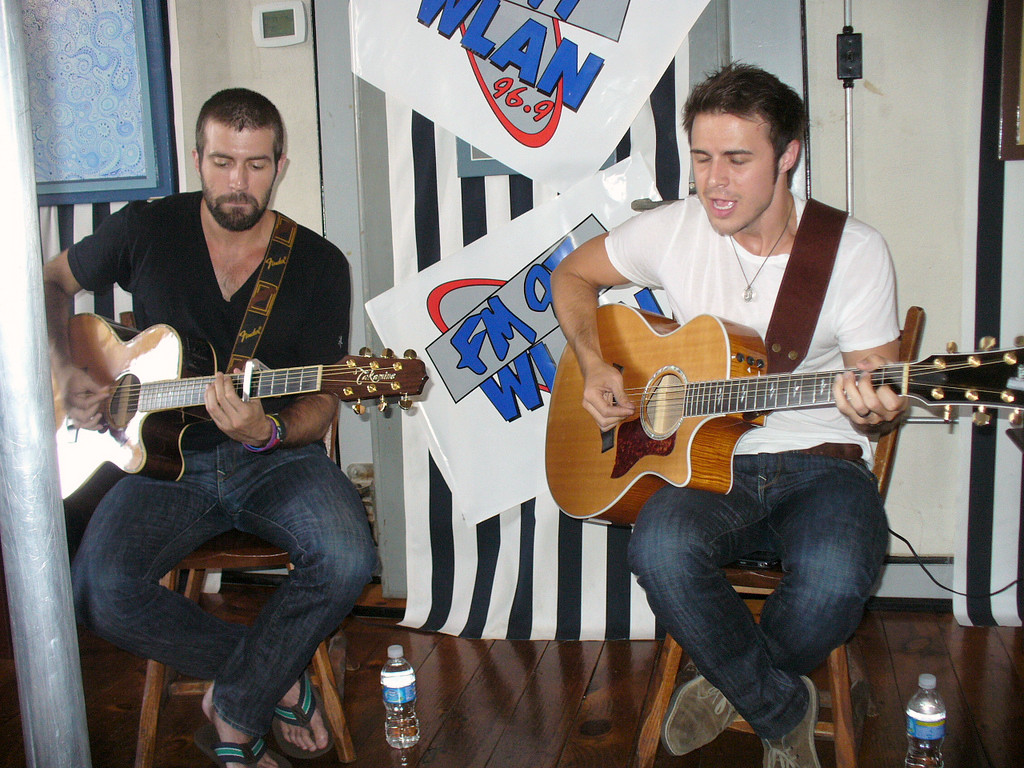 Kris Allen